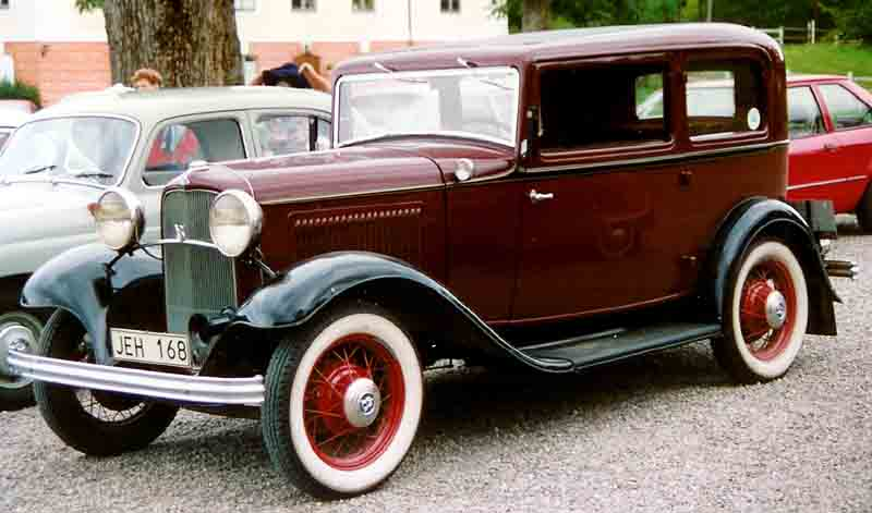 Ford Model 18 55 De Luxe Tudor Sedan 1932